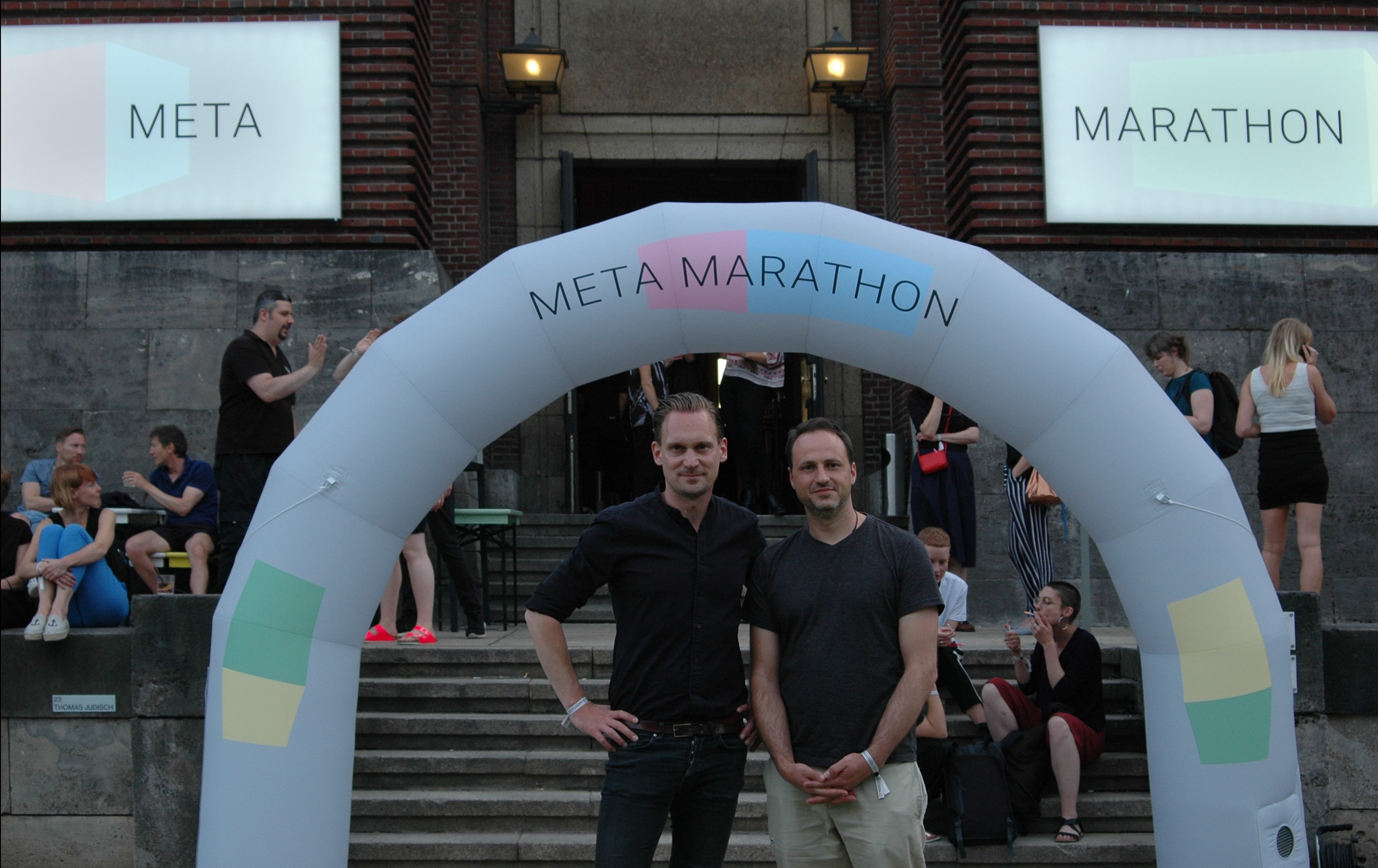 NRW-FORUM DÜSSELDORF, META Marathon, Festival-Direktor Christopher Peterka und Alain Bieber, künstlerischer Direktor und Geschäftsführer des NRW-Forums in Düsseldorf